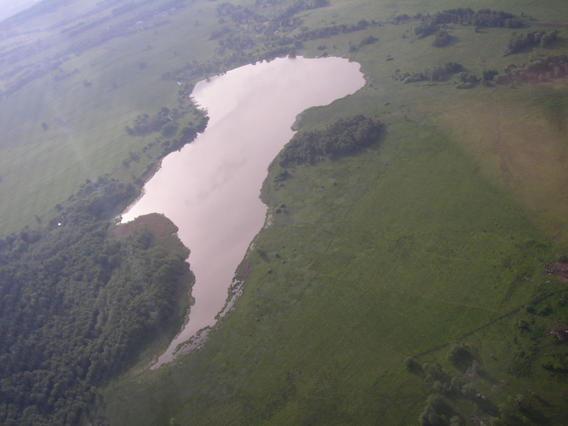 Velký rybník, Czech Republic